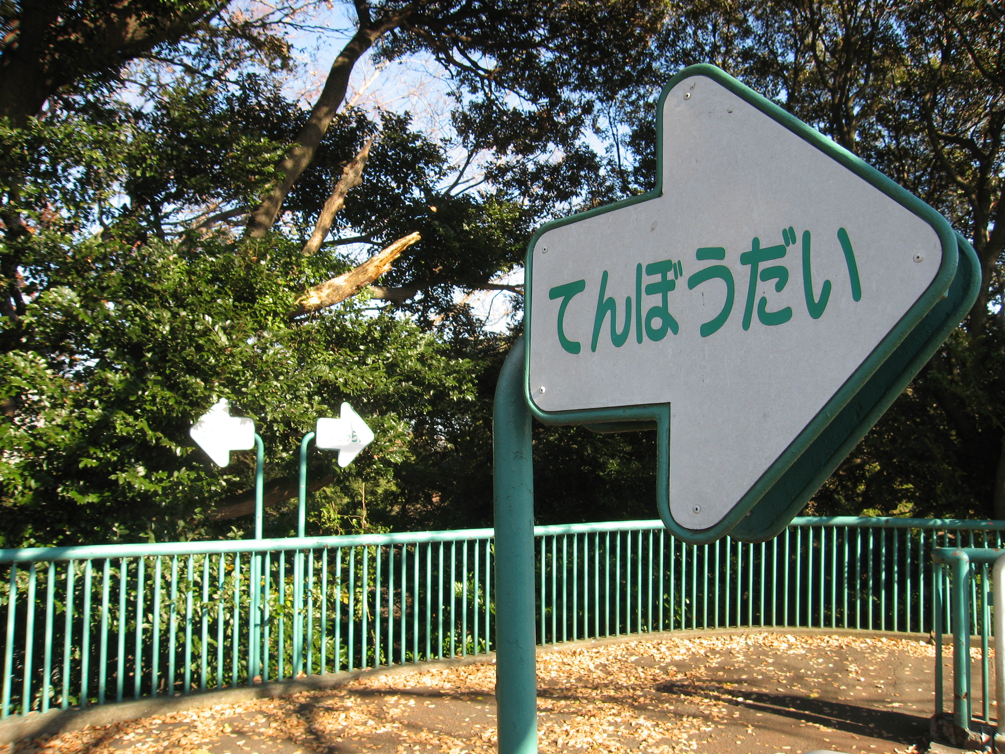 "Sign" Nogeyama Park (design by Sori Yanagi 1970) , Yokohama, Japan